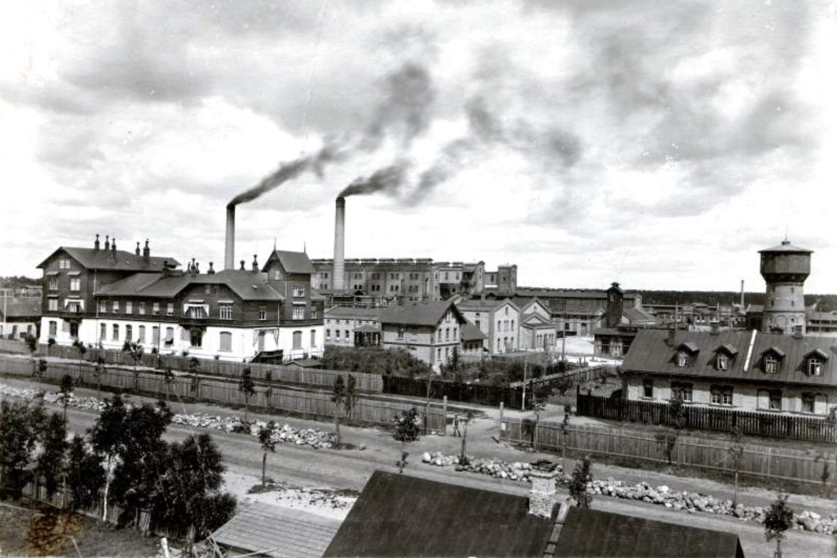 "Waldhofi" tselluloosivabrik Pärnus Papiniidus.